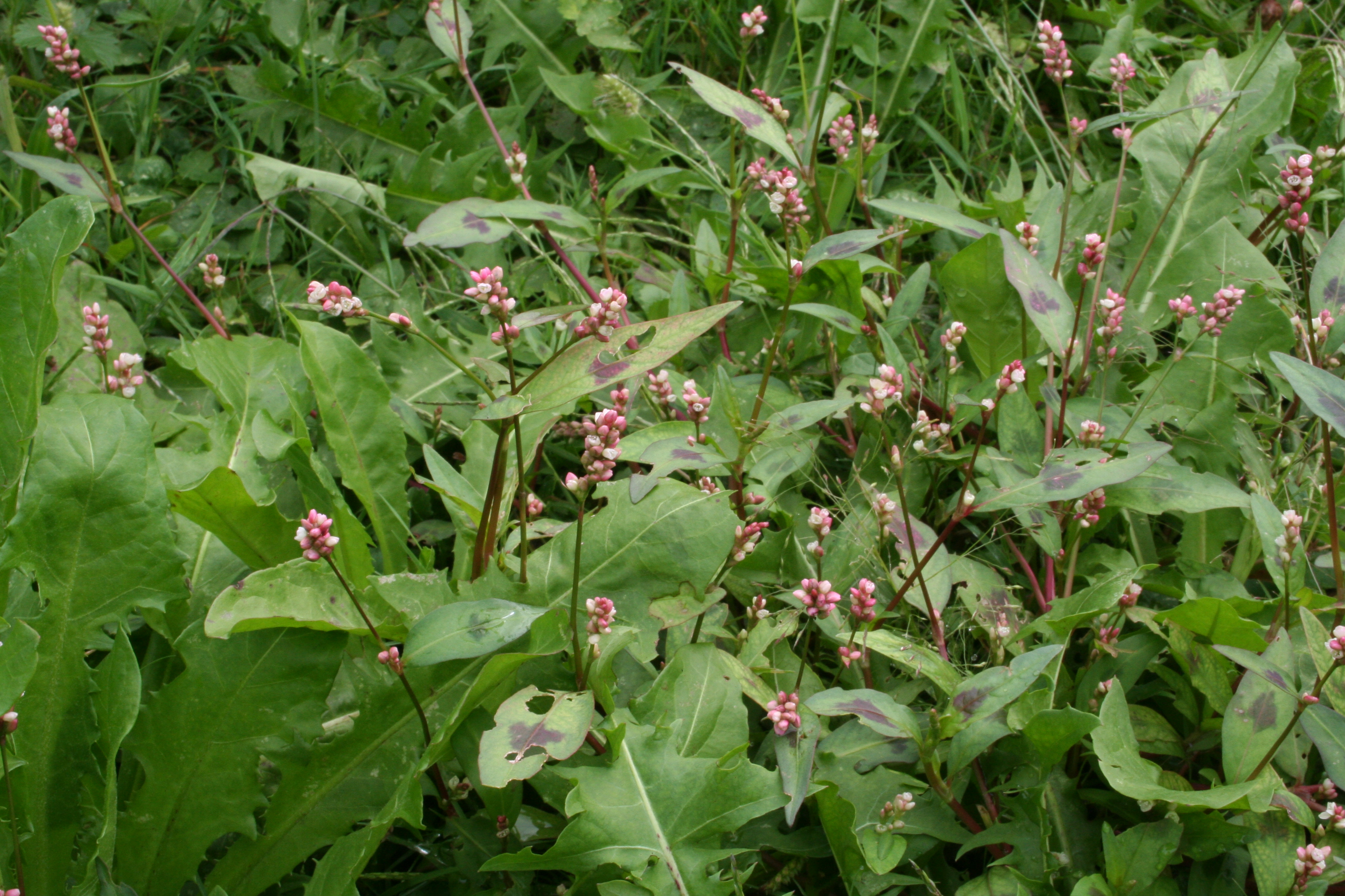 Persicaria_maculosa (sinonimo Polygonum persicaria) Località Villa Prima, Limana (BL), quota 350 m s.l.m.